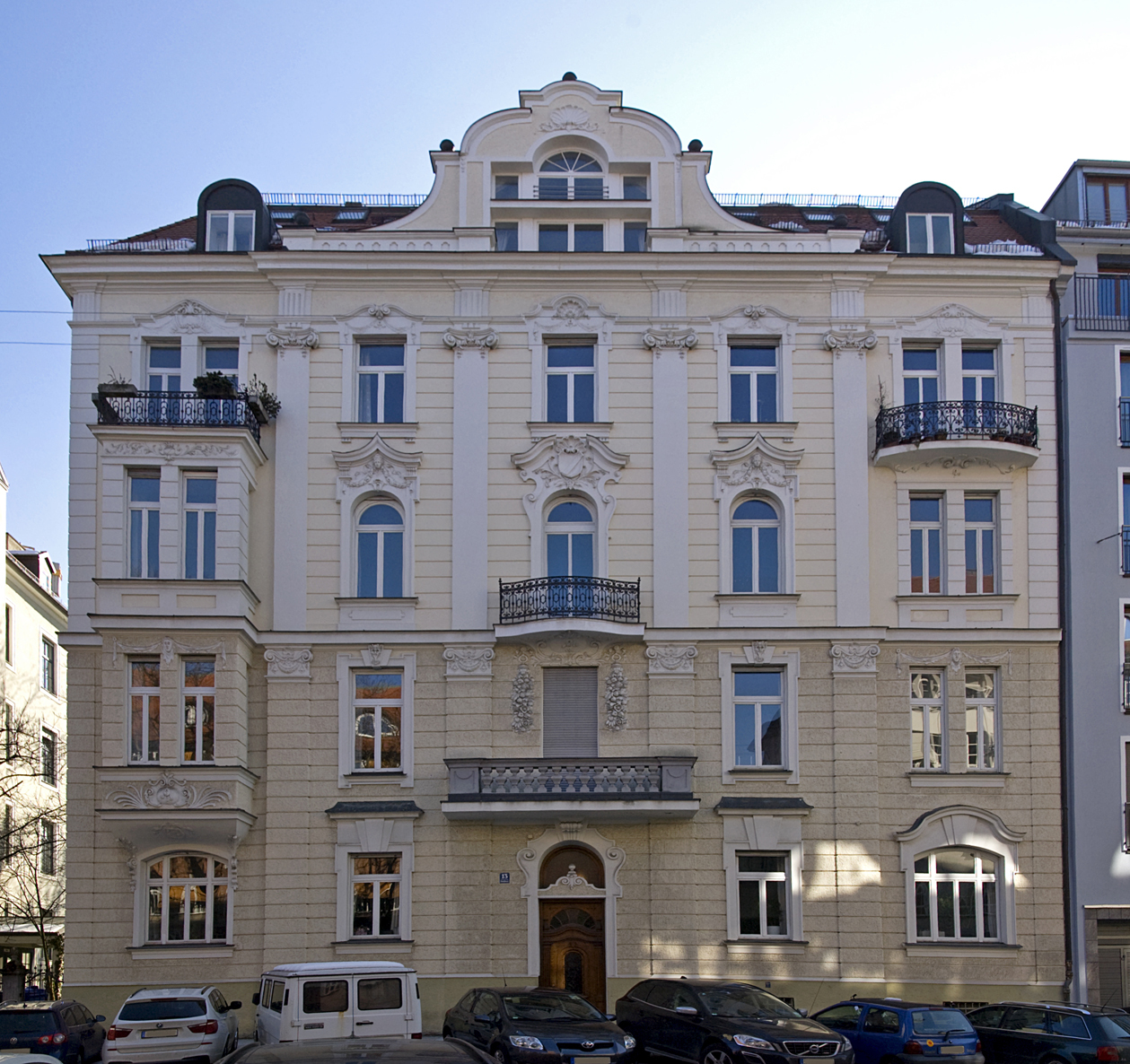 Ainmillerstraße 13, neubarock, reich gegliedert und stuckiert, 1897 von Fritz Schönmann.